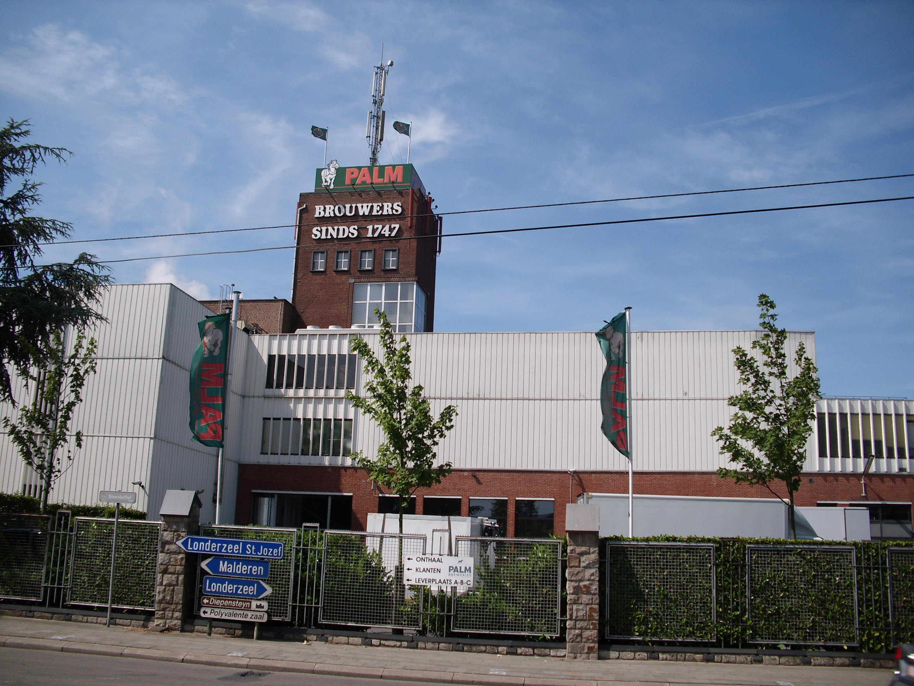 Brouwerij Palm - Steenhuffel - Londerzeel - Vlaams-Brabant - Vlaanderen - België